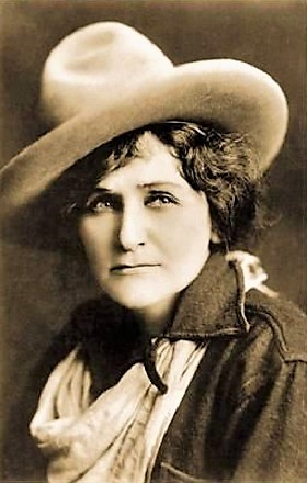 Louise Lester